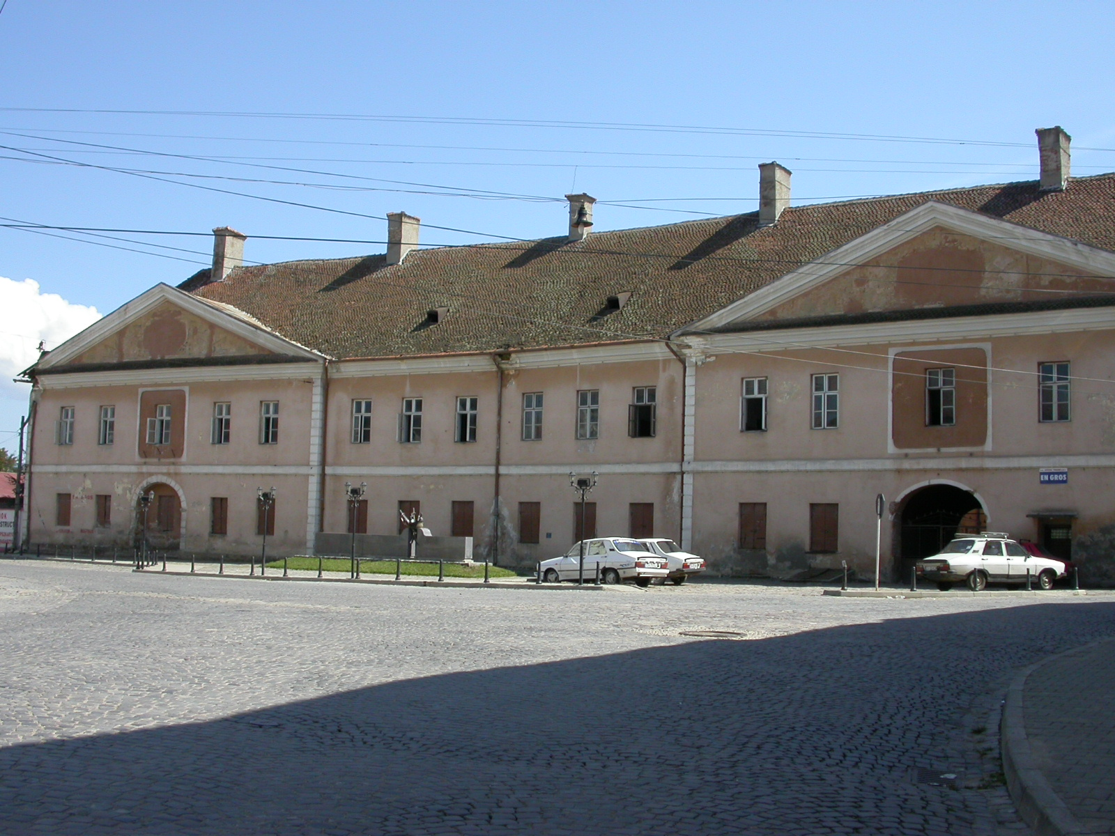 Fosta școală militară, 1819 - 1823